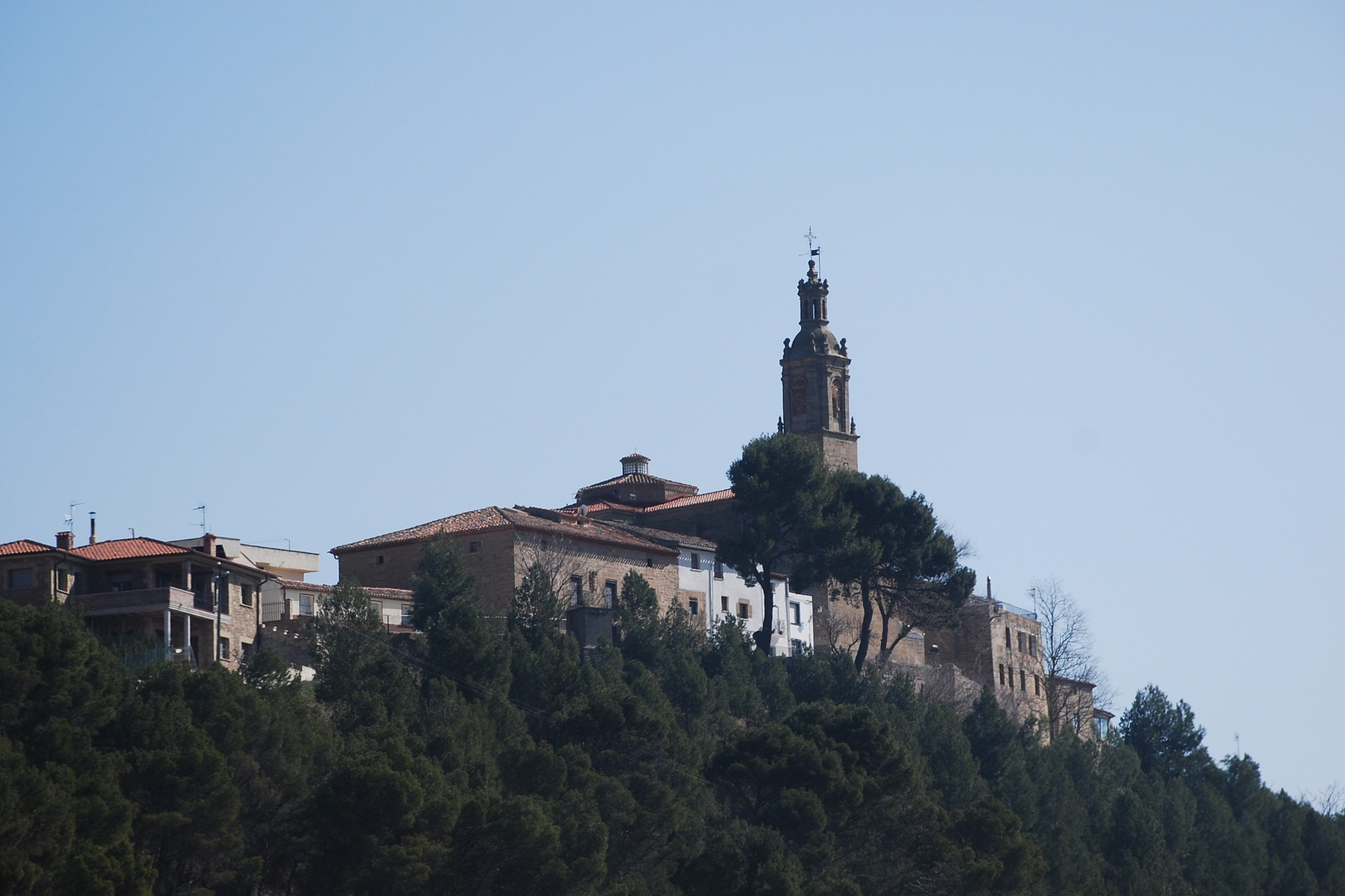 Torralba del Río (Navarra, España)